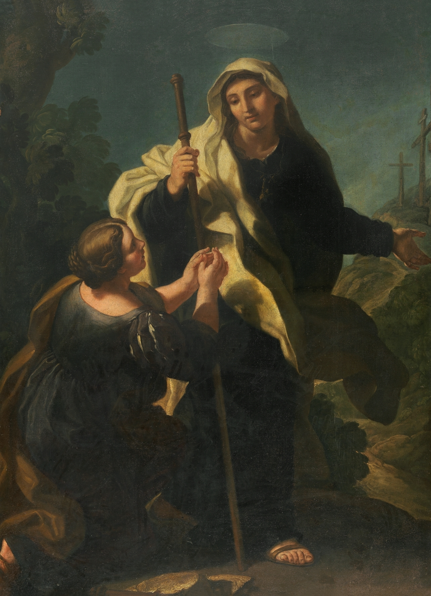 La obra representa a la emperatriz Santa Elena junto a su hija.